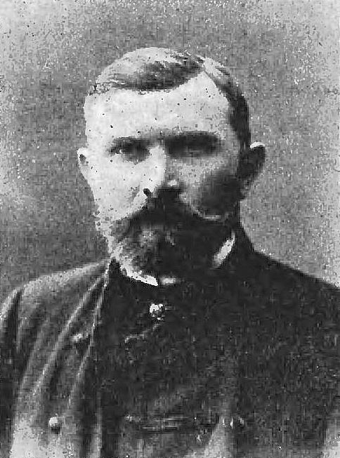 Michał Olszewski (-1907)